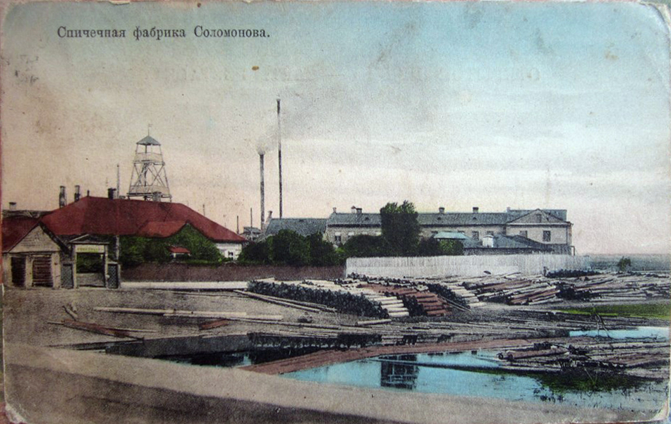 Беларуская (тарашкевіца): Барысаў (Barysaŭ), фабрыка Вікторыя (Viktoryja)